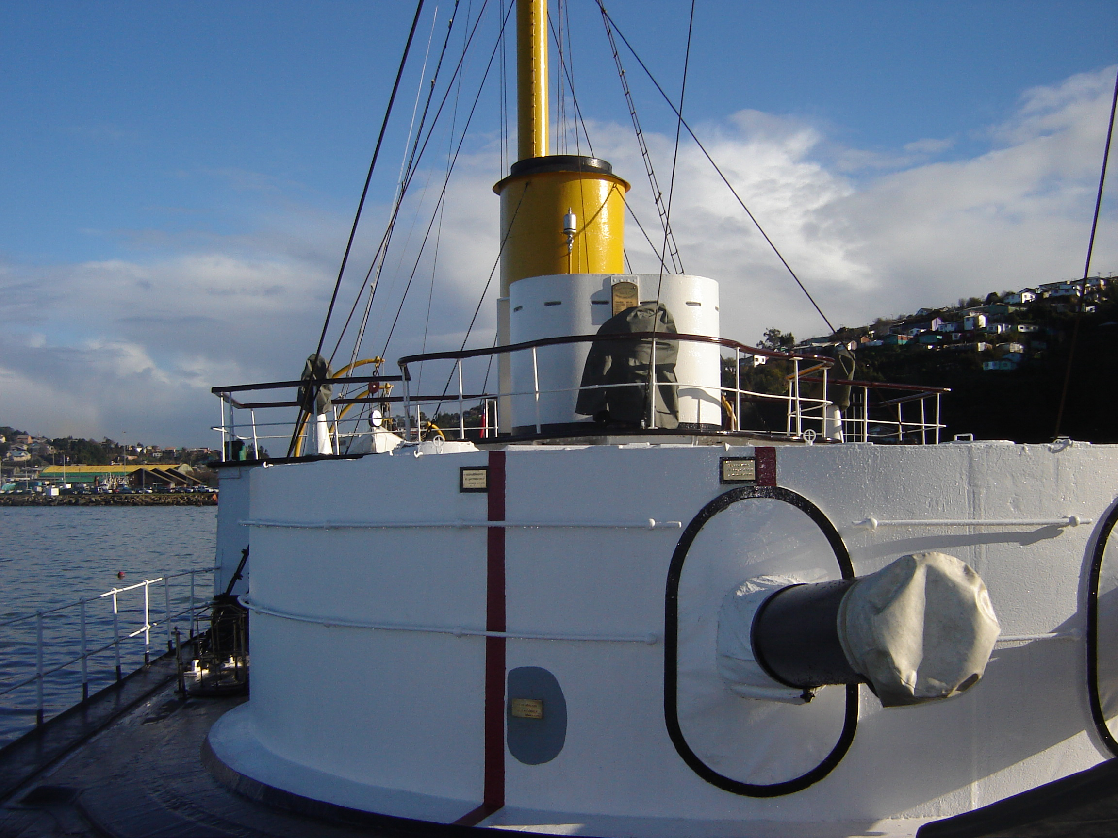 Foto obtenida por el Usuario Valo, el día 27 de julio de 2005 en Talcahuano, Chile. Los demás datos se revelan abajo.